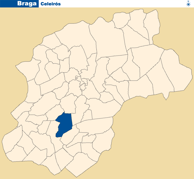 Localização de Celeirós no concelho de Braga.